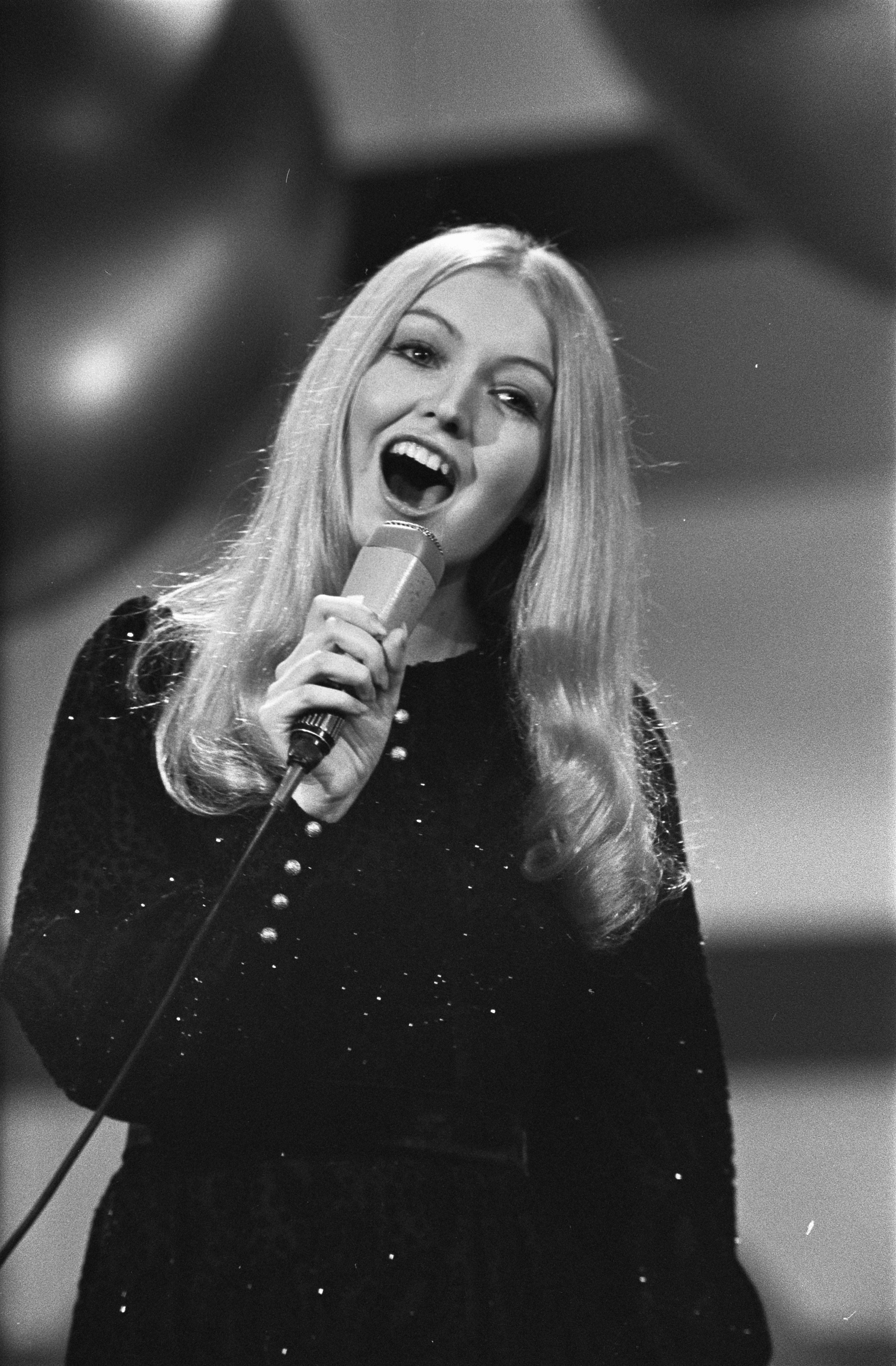 Collectie / Archief : Fotocollectie Anefo Reportage / Serie : Eurovisie Songfestival 1970 in RAI te Amsterdam Beschrijving : Mary Hopkin Datum : 21 maart 1970 Locatie : Amsterdam, Noord-Holland Trefwoorden : artiesten, songfestivals, zangers Persoonsnaam : Hopkin, Mary Instellingsnaam : Eurovisie Song Festival Fotograaf : Koch, Eric / Anefo Auteursrechthebbende : Nationaal Archief Materiaalsoort : Negatief (zwart/wit) Nummer archiefinventaris : bekijk toegang 2.24.01.05 Bestanddeelnummer : 923-3712 Reacties Geplaatst door Musiclady op 28 juli 2016 - 09:40. deelneemster voor Engeland Mary Hopkin zingt 'Knock knock'. Persoonsnaam: Hopkin, Mary NB. Zij werd tweede op dit 15-e Eurovisie Songfestival.